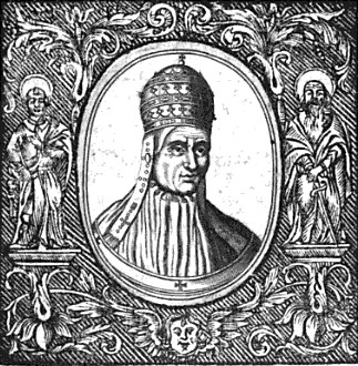 Papež Bonifác IX.